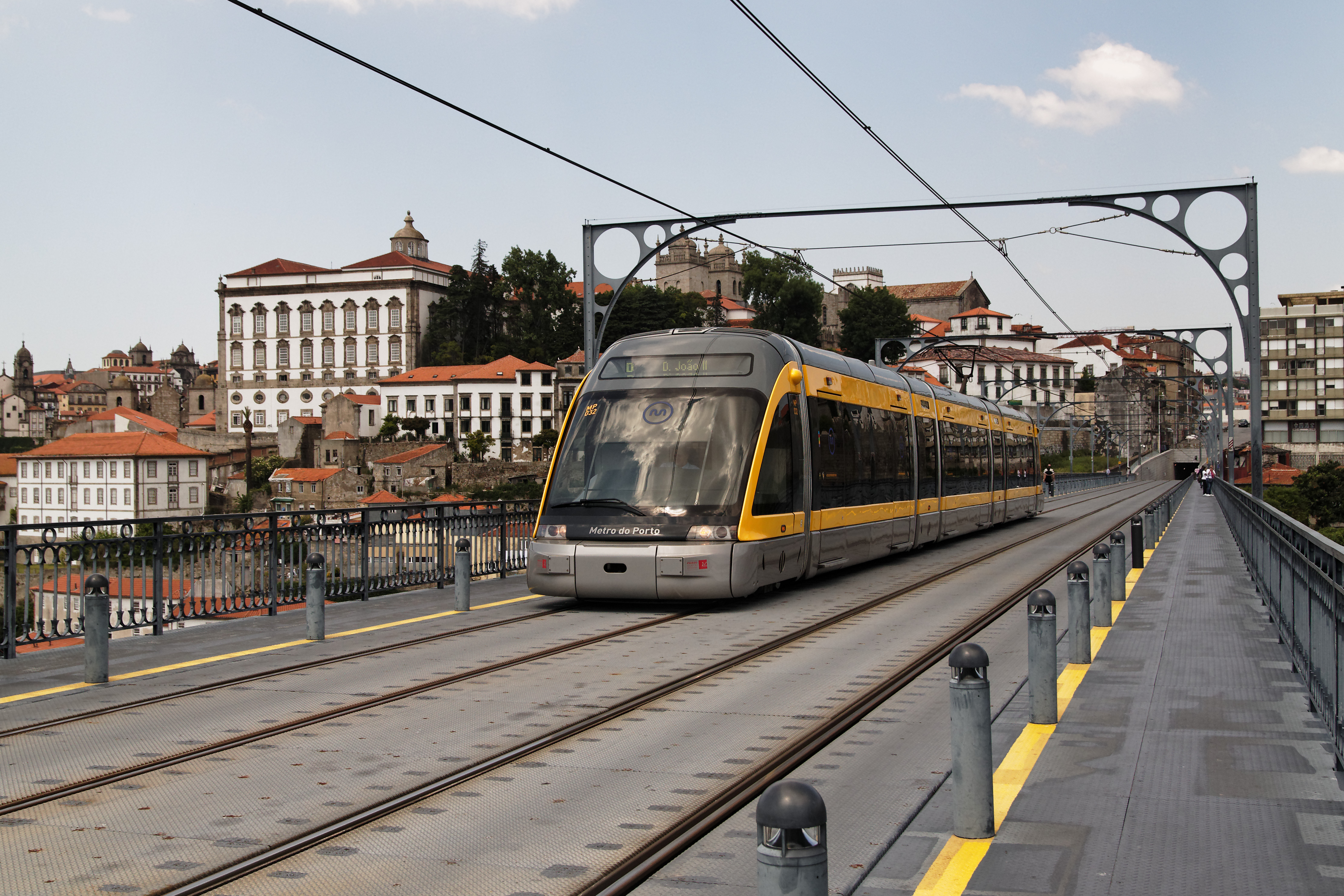 Tren del Metro de Porto Cruzando el puente de Luis I. Portugal.